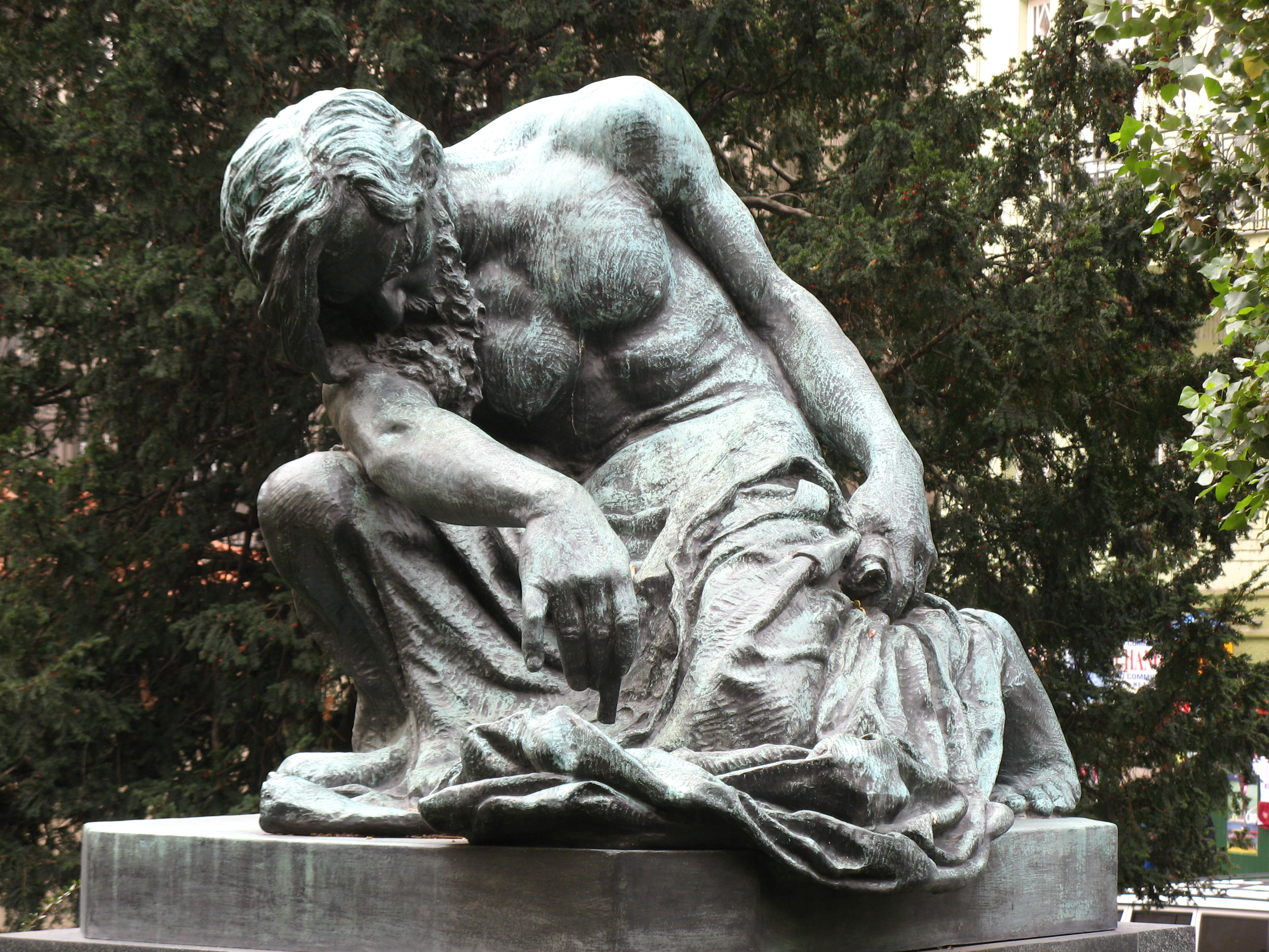 František Bilek, Moses (1905), Statue in Prag vor der Altneusynagoge